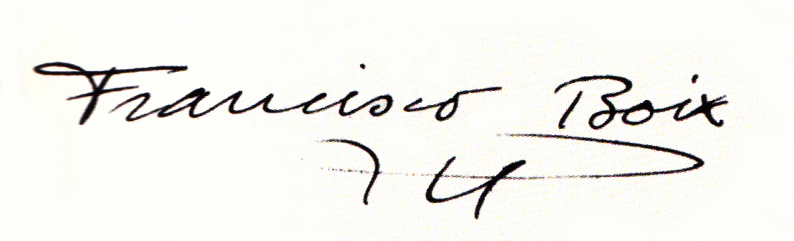 Firma de Francisco Boix